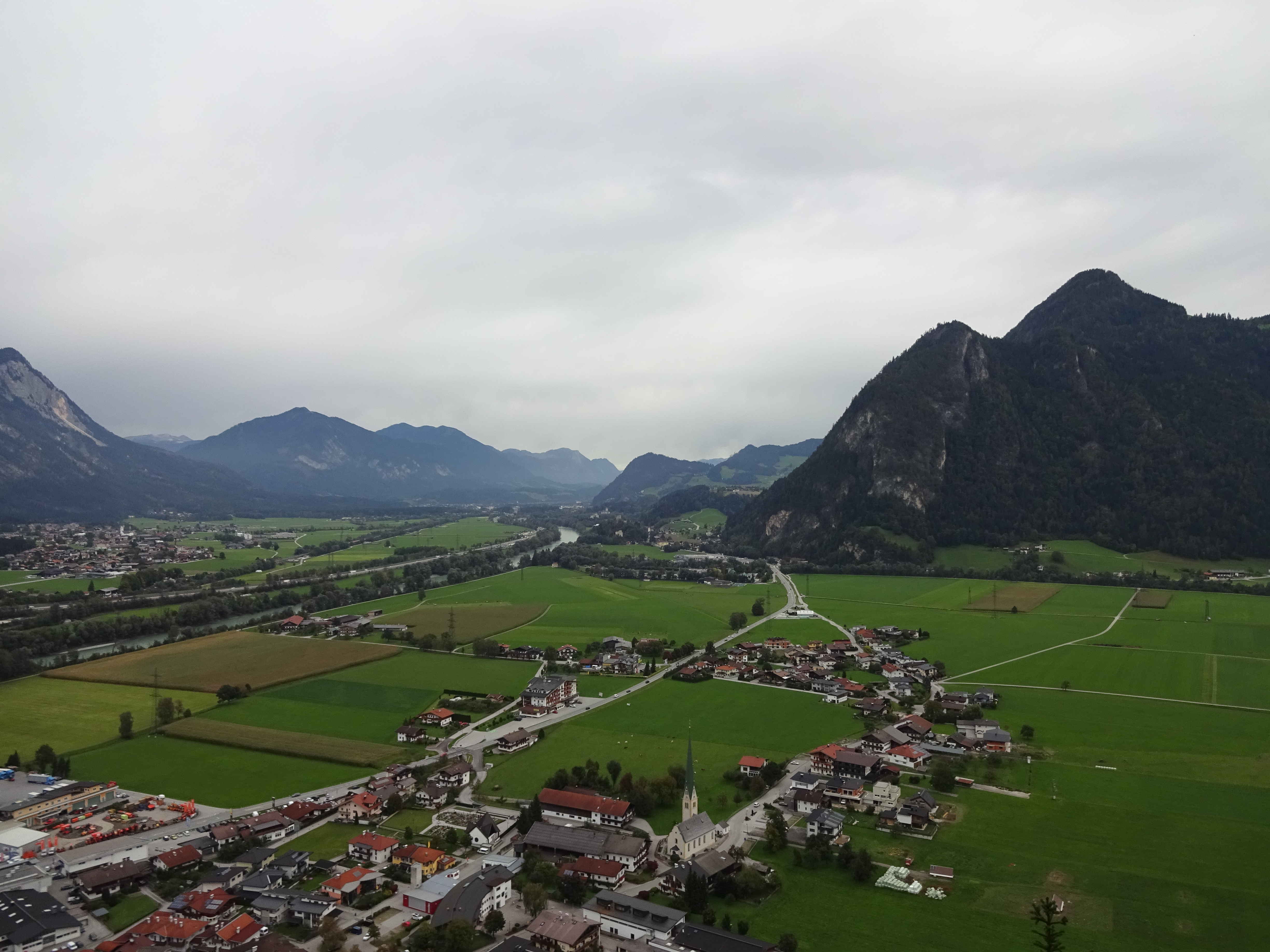 Blick von der Brettfall auf Strass im Zillertal und ins Unterinntal